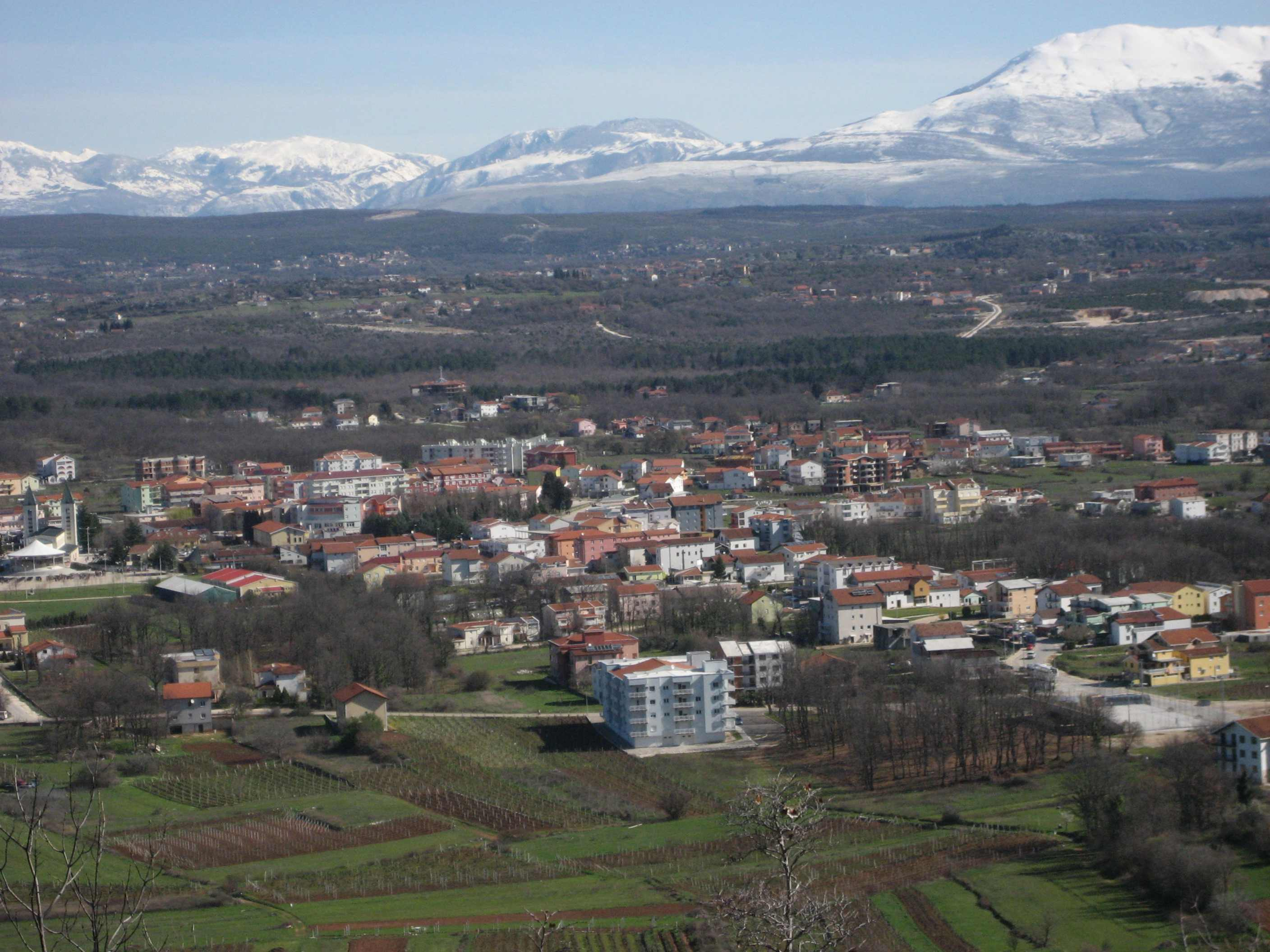 Medjugorje